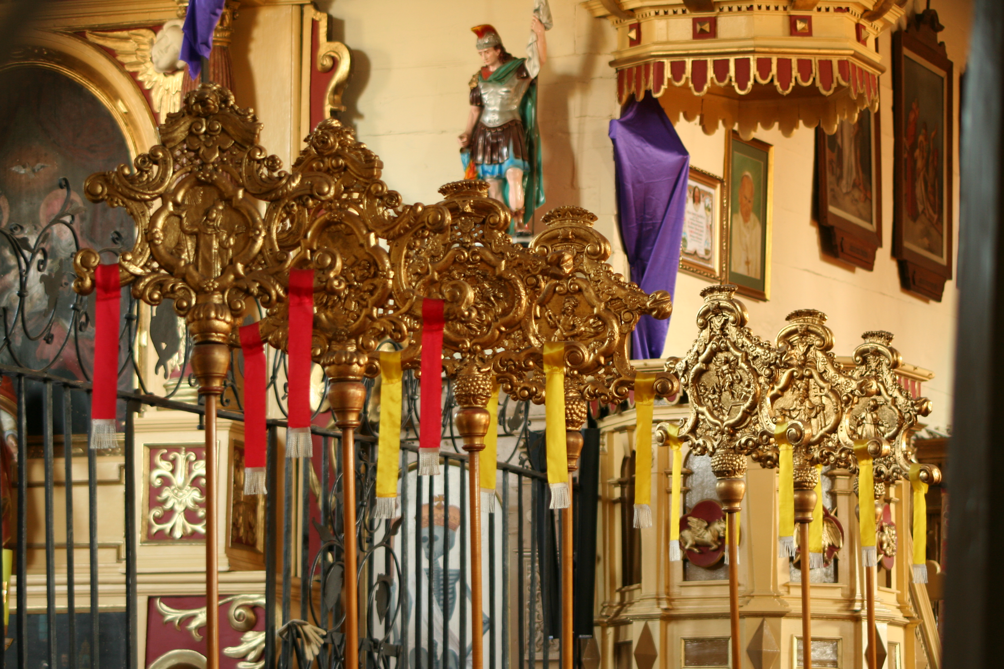 Feretrony w kościele parafialnym w Boronowie, powiat lubliniecki, województwo śląskie